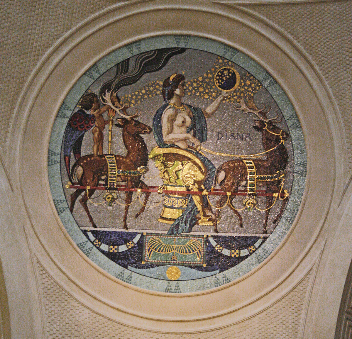 Mosaikmedaillon der Diana im Foyer des Wiesbadener Kurhauses